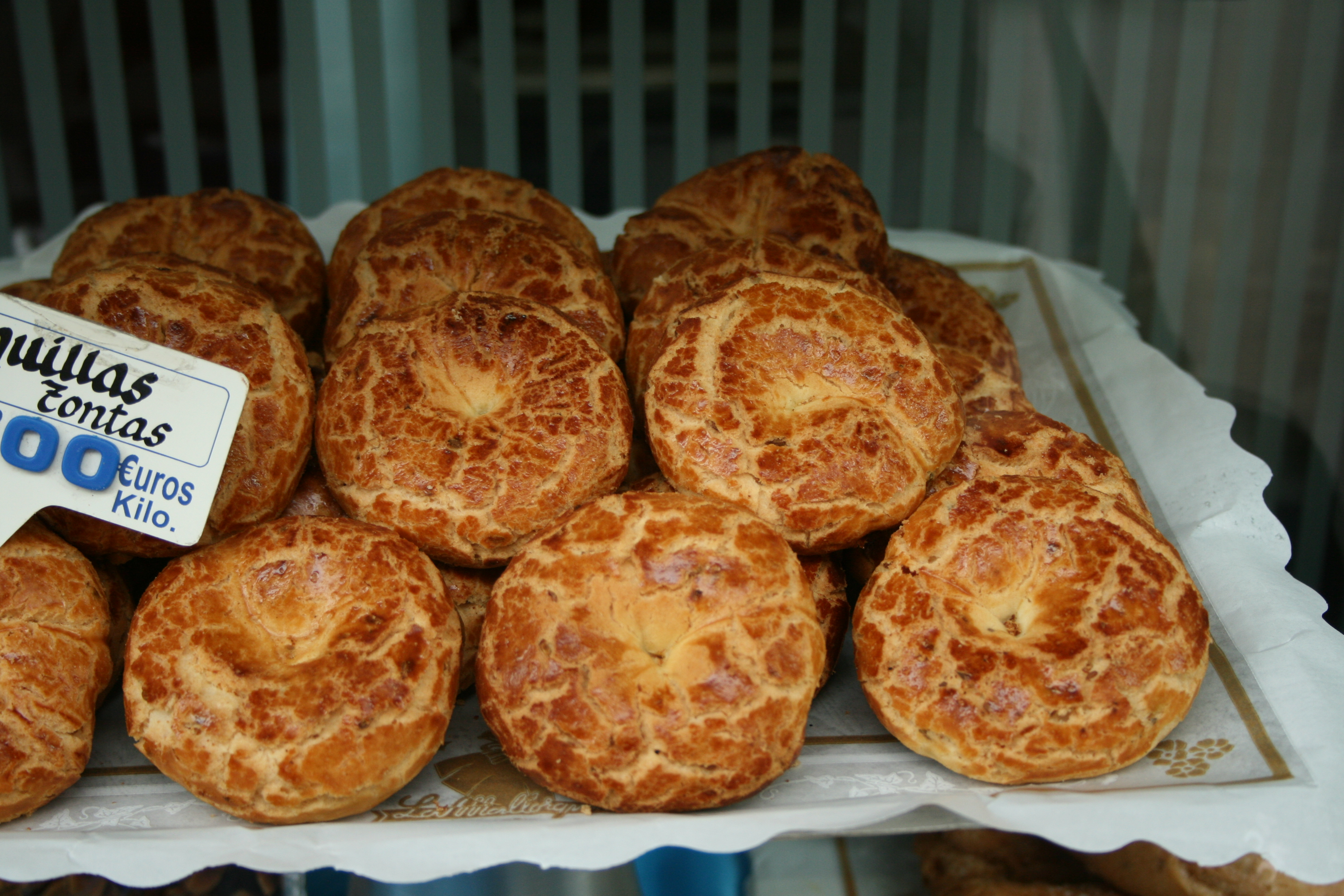 Rosquillas tontas - En contraposición con las listas